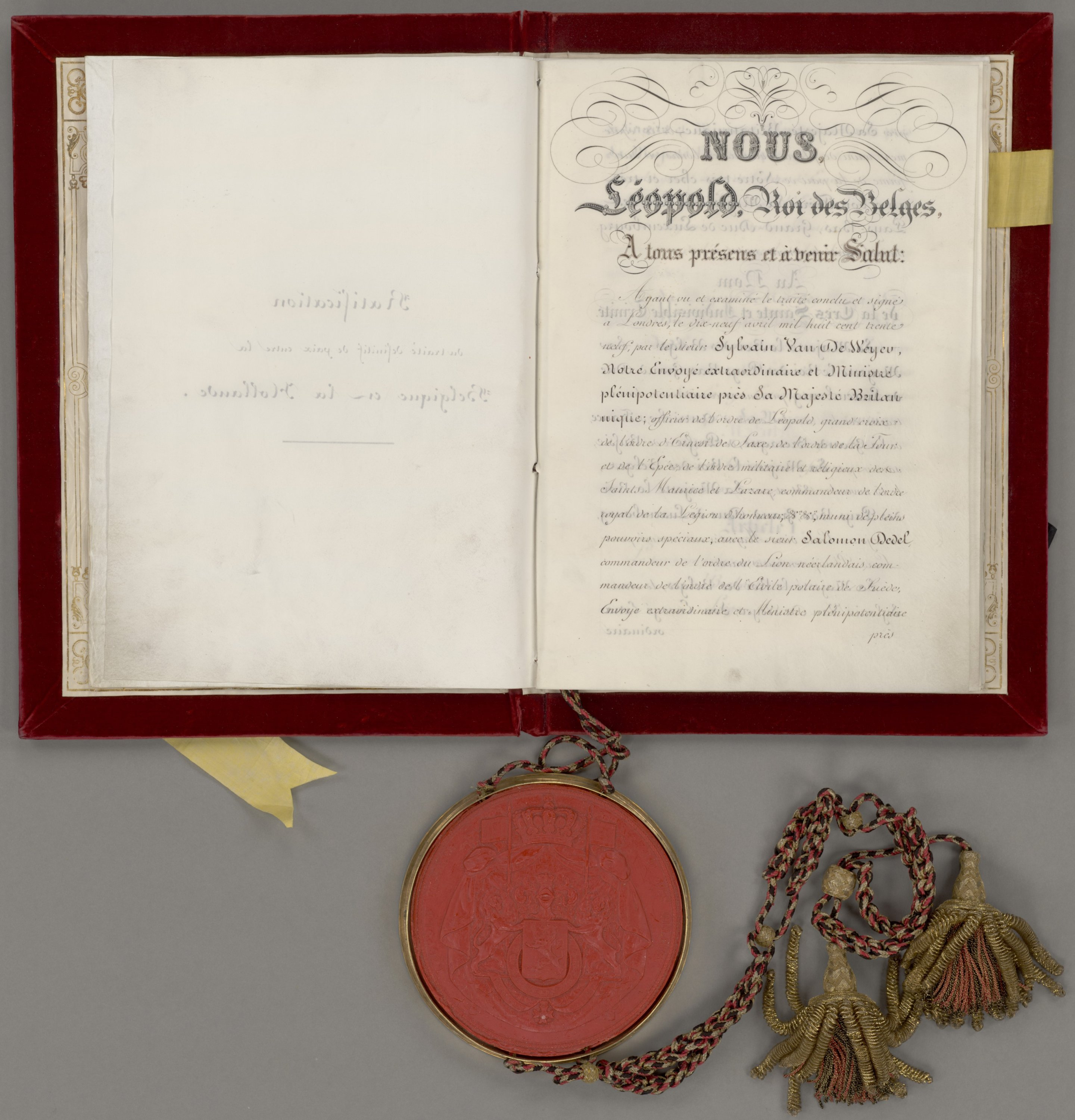 Scheidingsverdrag met België 19 april 1839